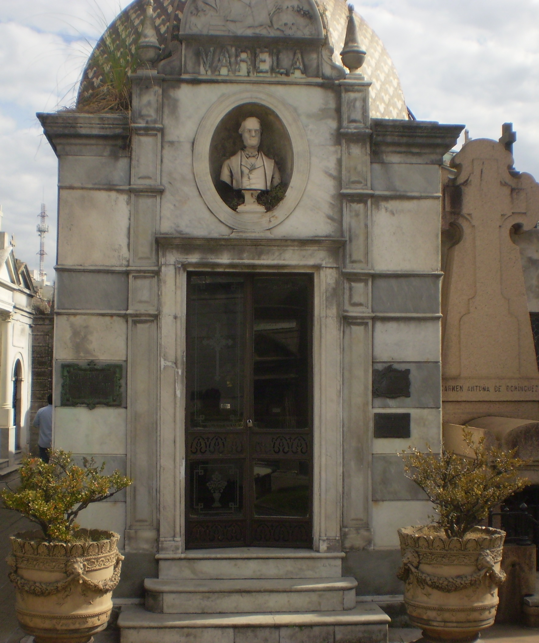 Bóveda de Florencio Varela, Cementerio de la Recoleta, Buenos Aires.